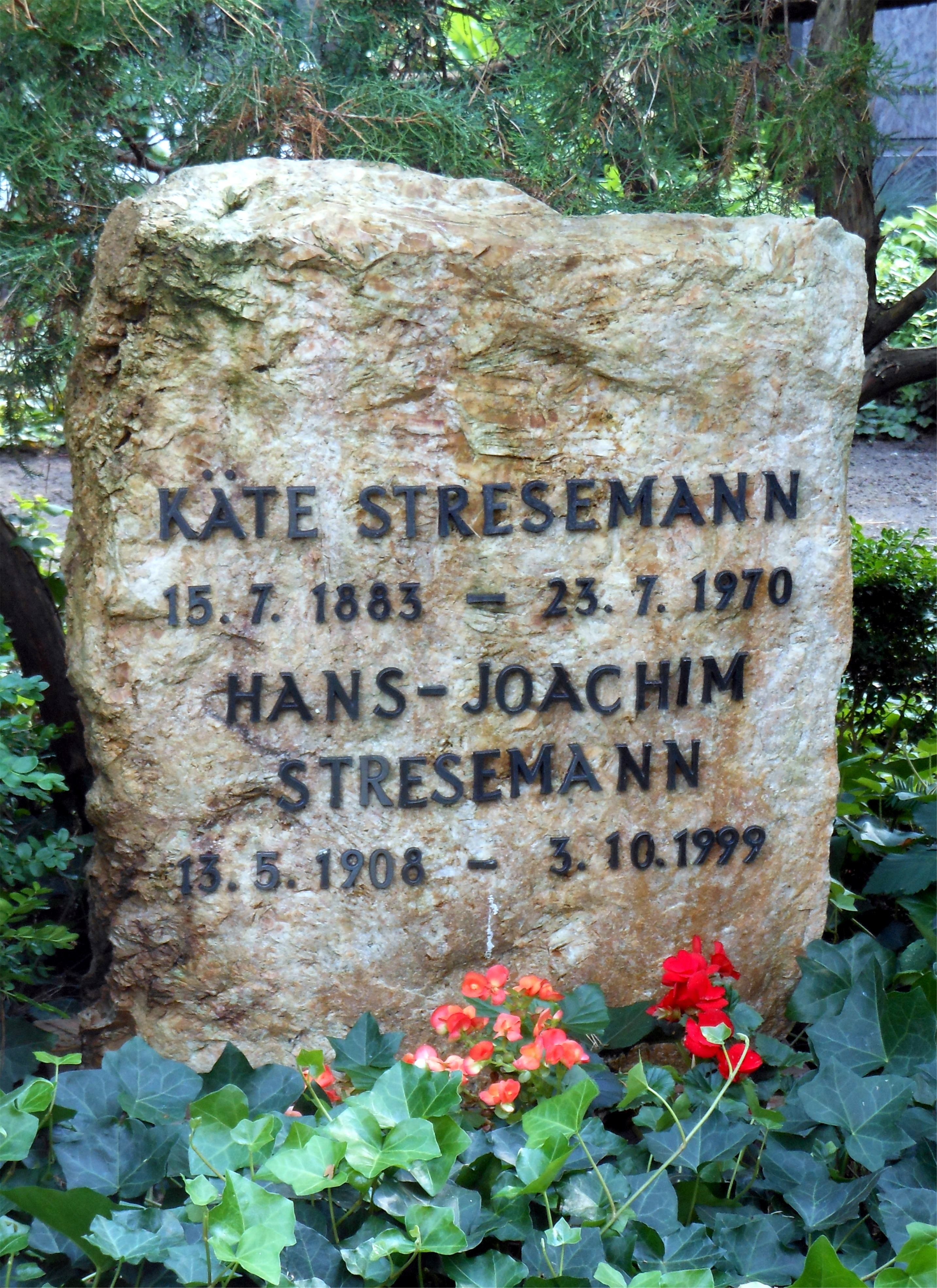 Grabstein Käte Stresemann auf dem Waldfriedhof Dahlem, Hüttenweg 47, 14195 Berlin–Zehlendorf